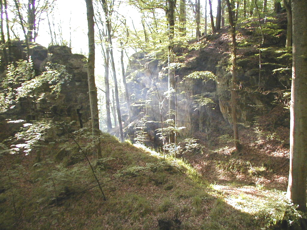 Paysage dans le Grès de Luxembourg, Muellerthal